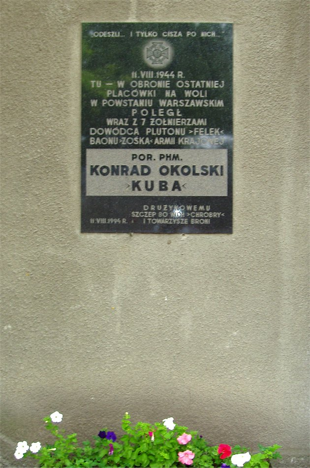 Przy ul. Spokojnej w Warszawie (fot Zu)